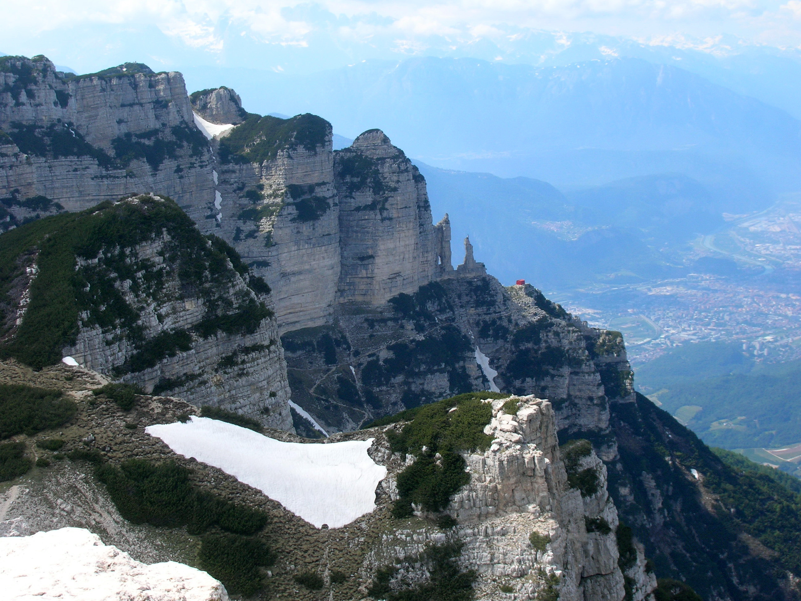 Vigolana, Madonnina e bivacco Vigolana dal Becco di Filadonna